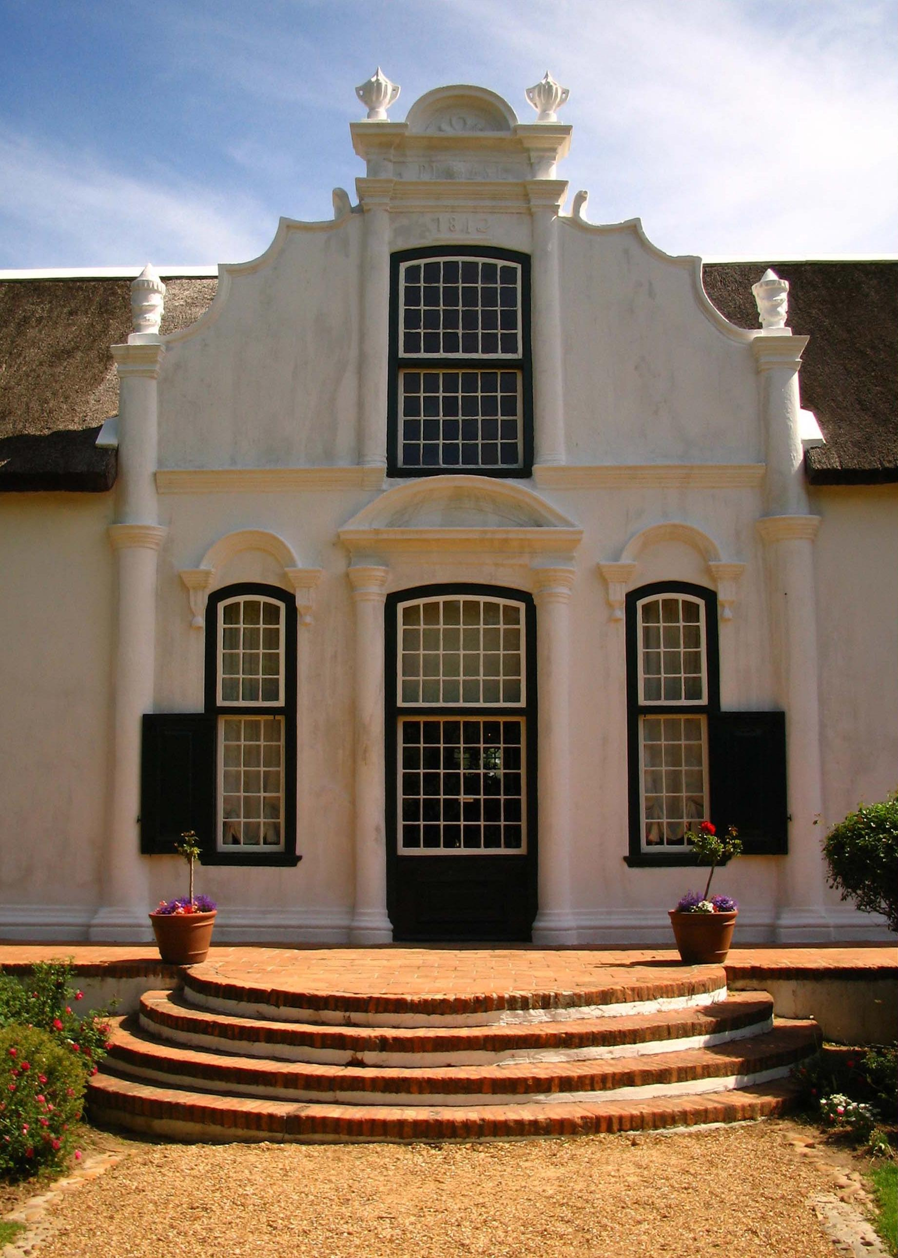 Achtergevel Huis Boschendal, Franschhoek, Zuid-Afrika.